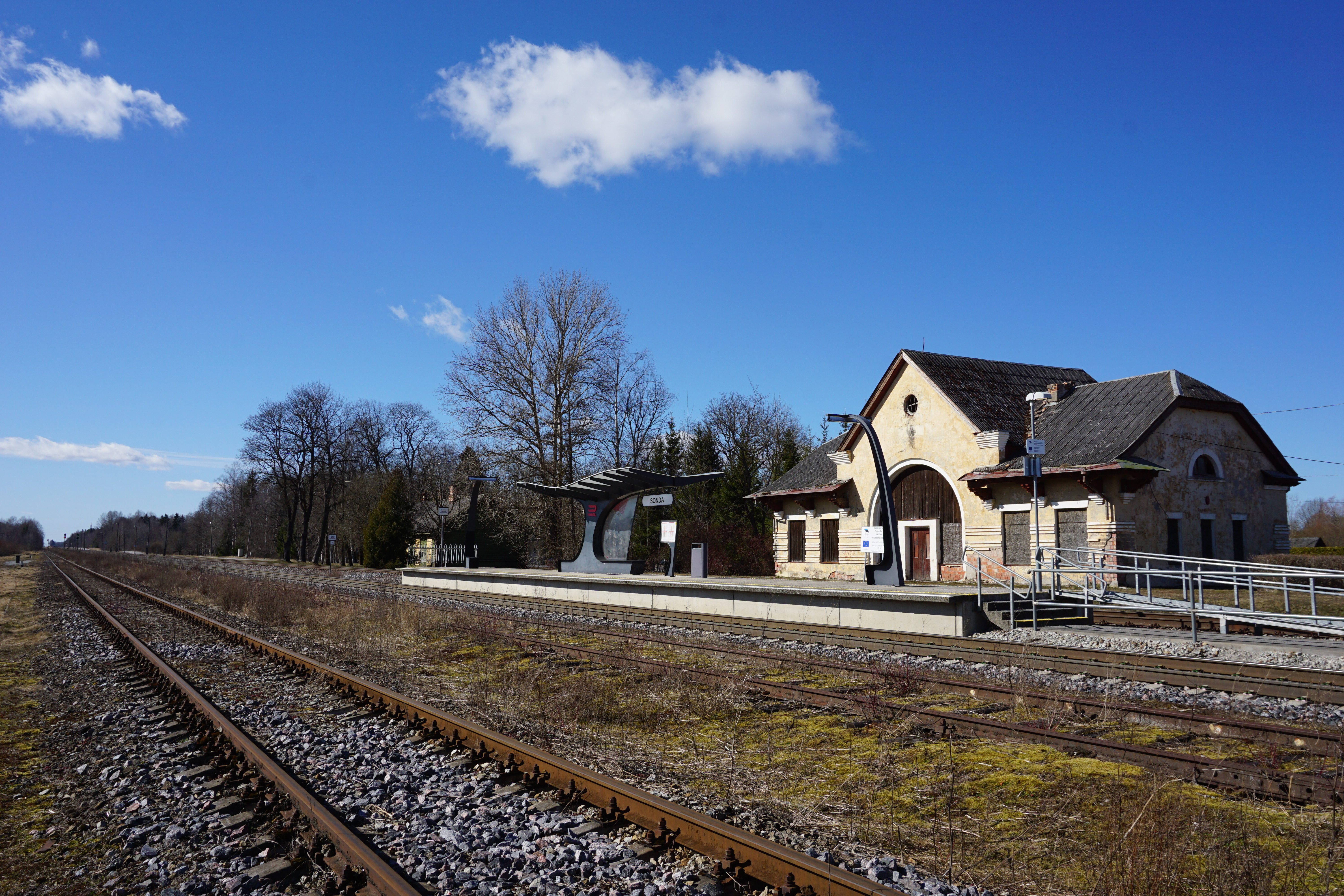 Sonda raudteejaam ja perroon